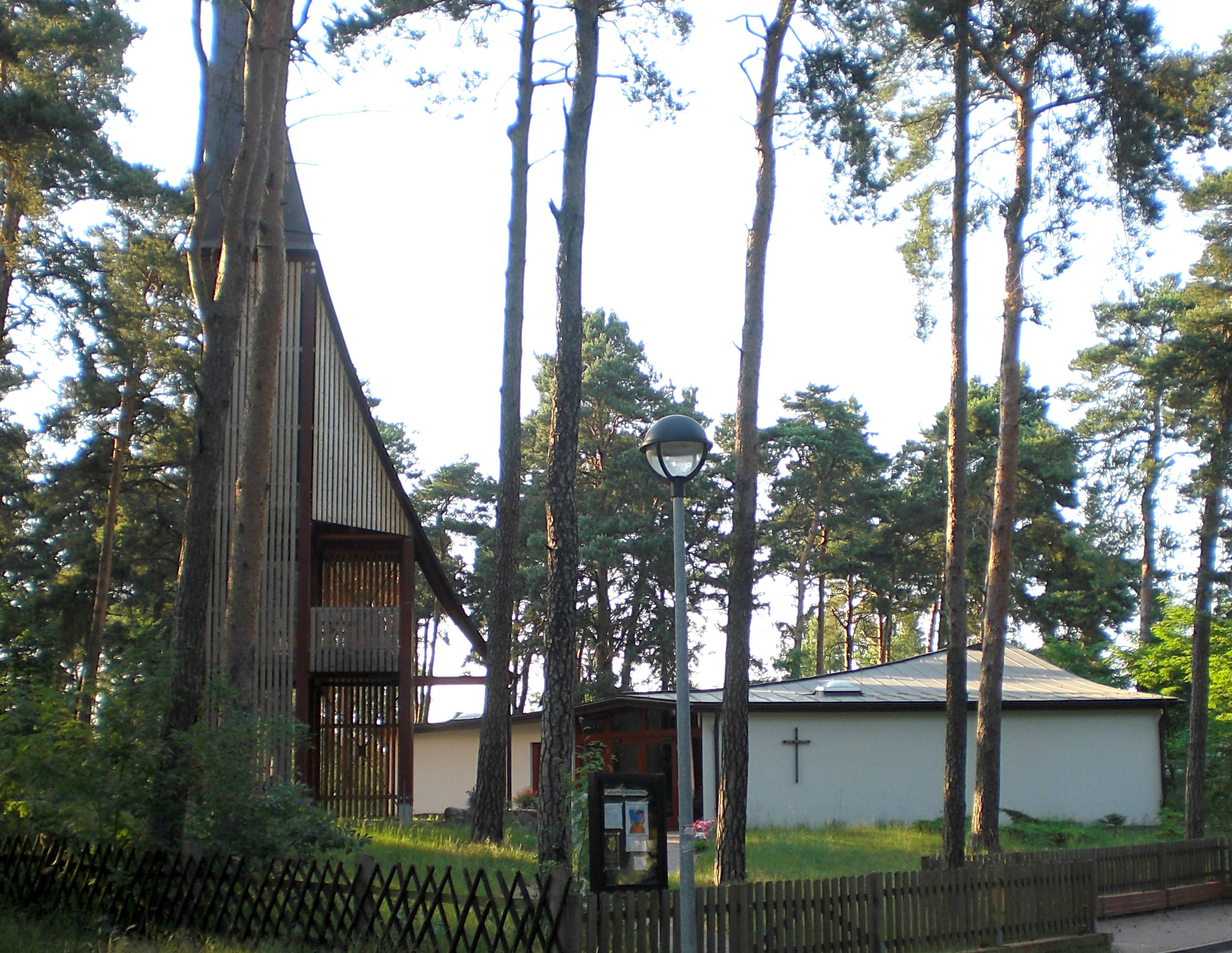 Kirche in Möser, Südseite, Blick von der Straße